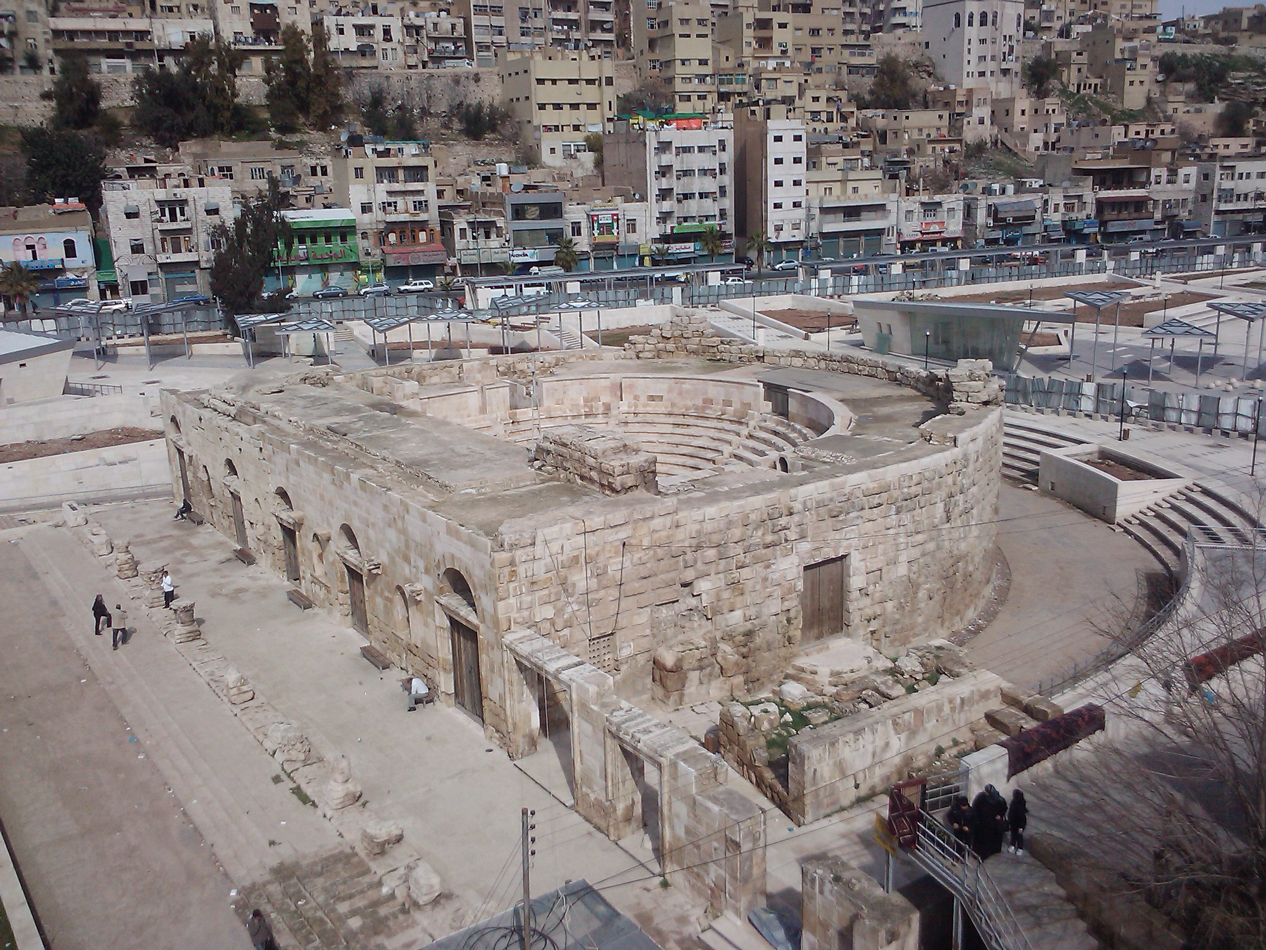 الاوديوم مسرح صغير للاحتفالات و سماع الموسيقى، يعود تاريخ بناؤه إلى القرن الثاني الميلادي